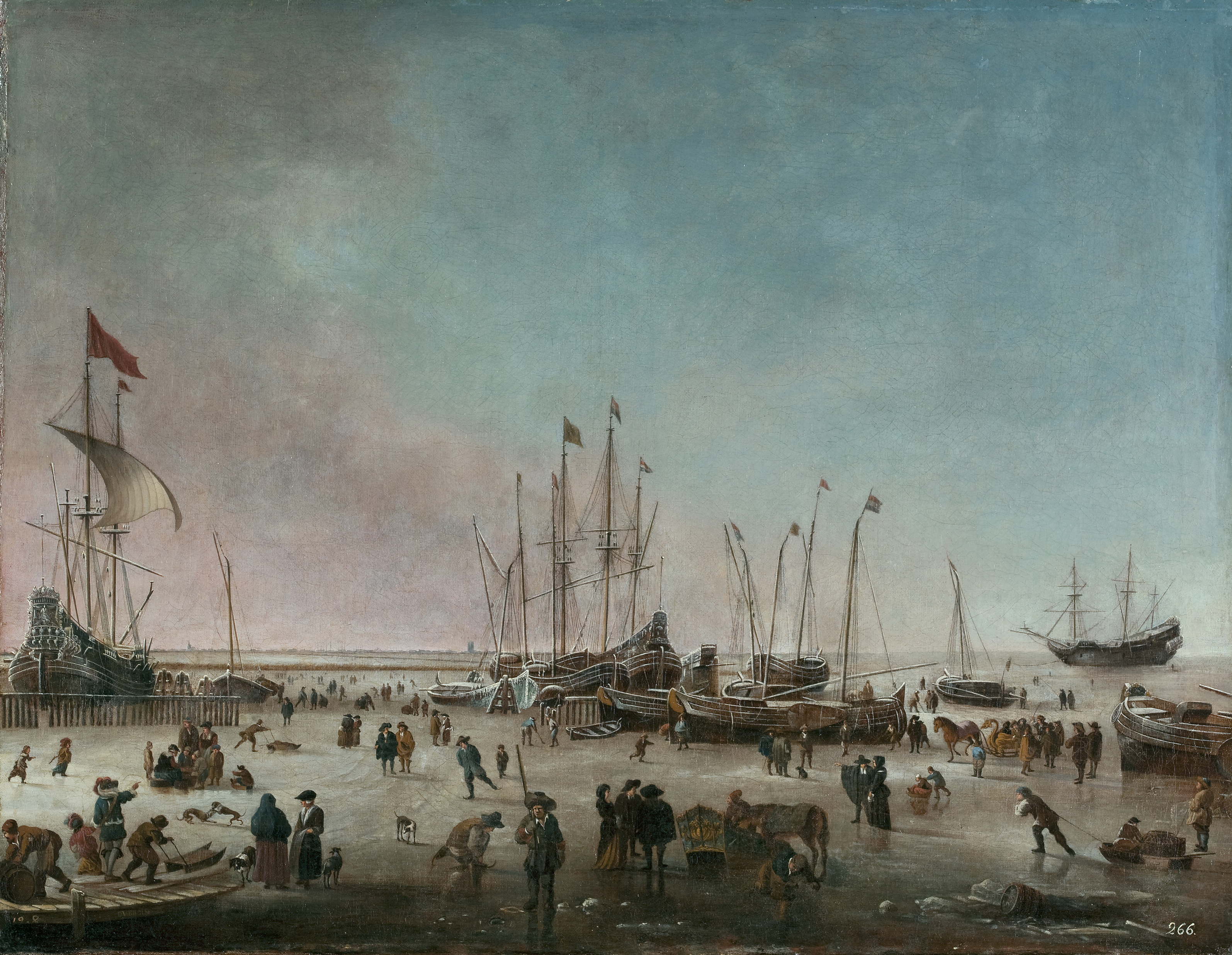 The port of Amsterdam in winterlabel QS:Lde,"Der Hafen von Amsterdam im Winter"label QS:Len,"the port of Amsterdam in winter"label QS:Les,"El puerto de Ámsterdam en invierno"